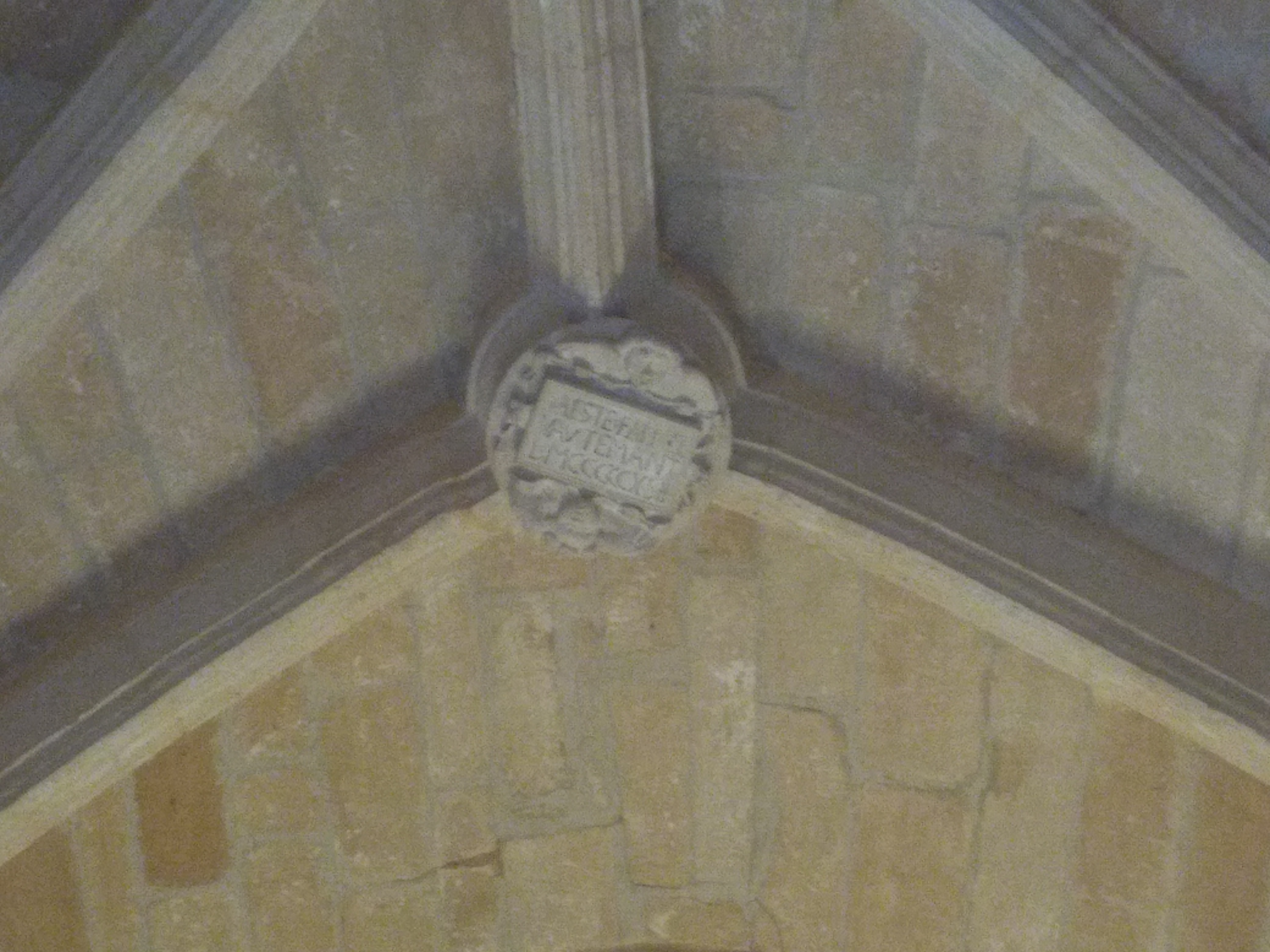 Église Saint-Caprais de Carsac .